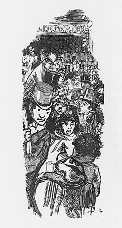 "La sortie de l'Eldorado à Paris", in Georges Montorgueil, aut. du texte, Illustrations de Paris au hasard, p. 80